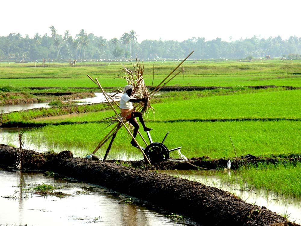 ചക്രം